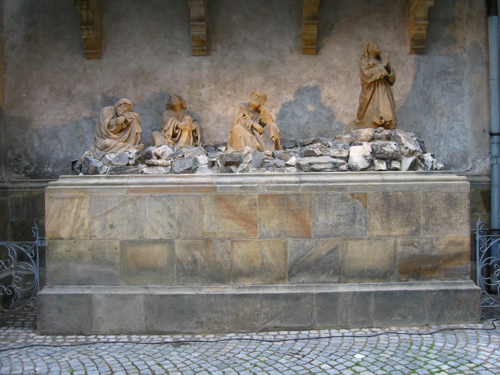 Sousoší Olivetské hory u chrámu sv. Mořice v Olomouci